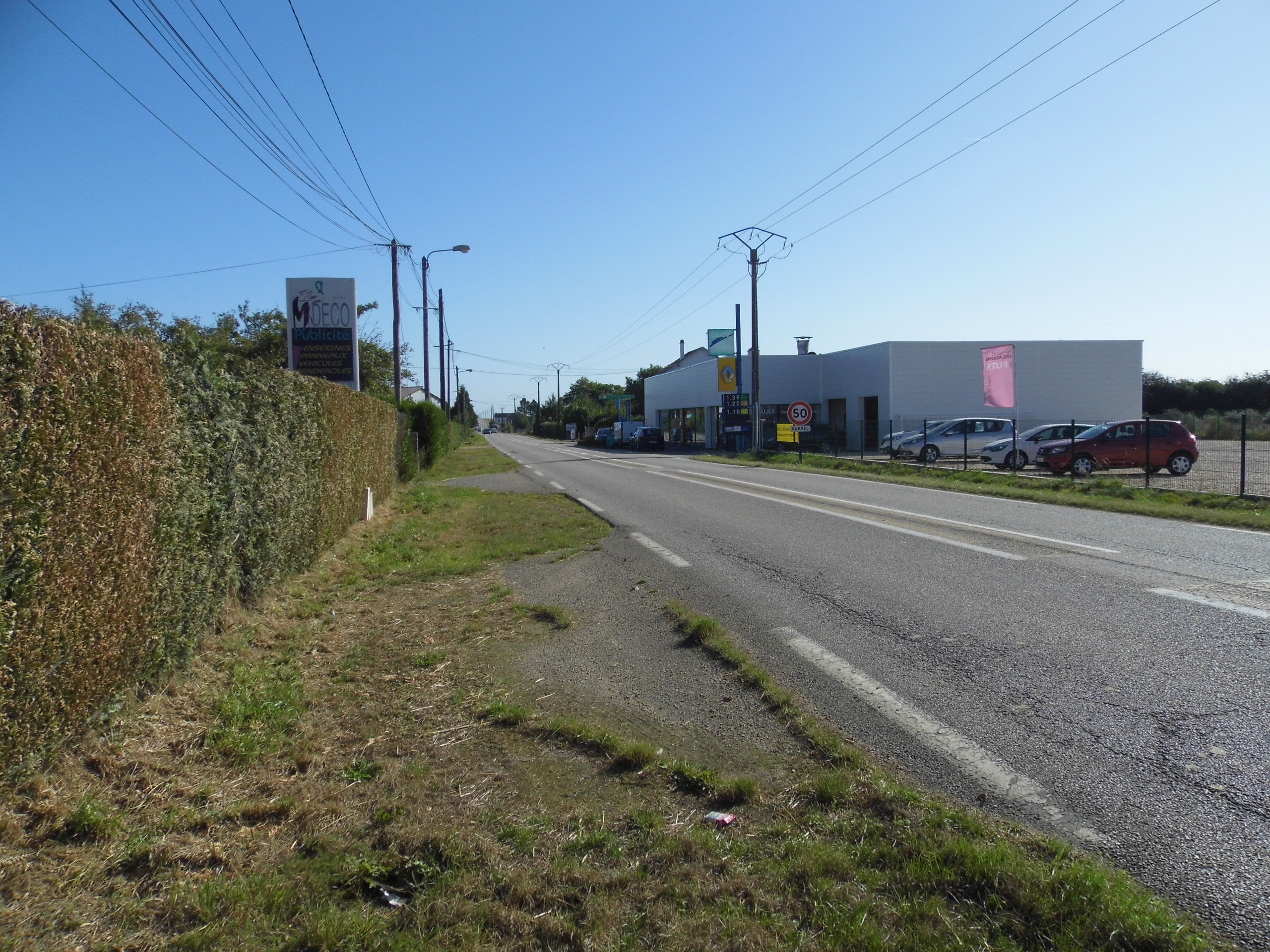 MARBEUF Entrée de village